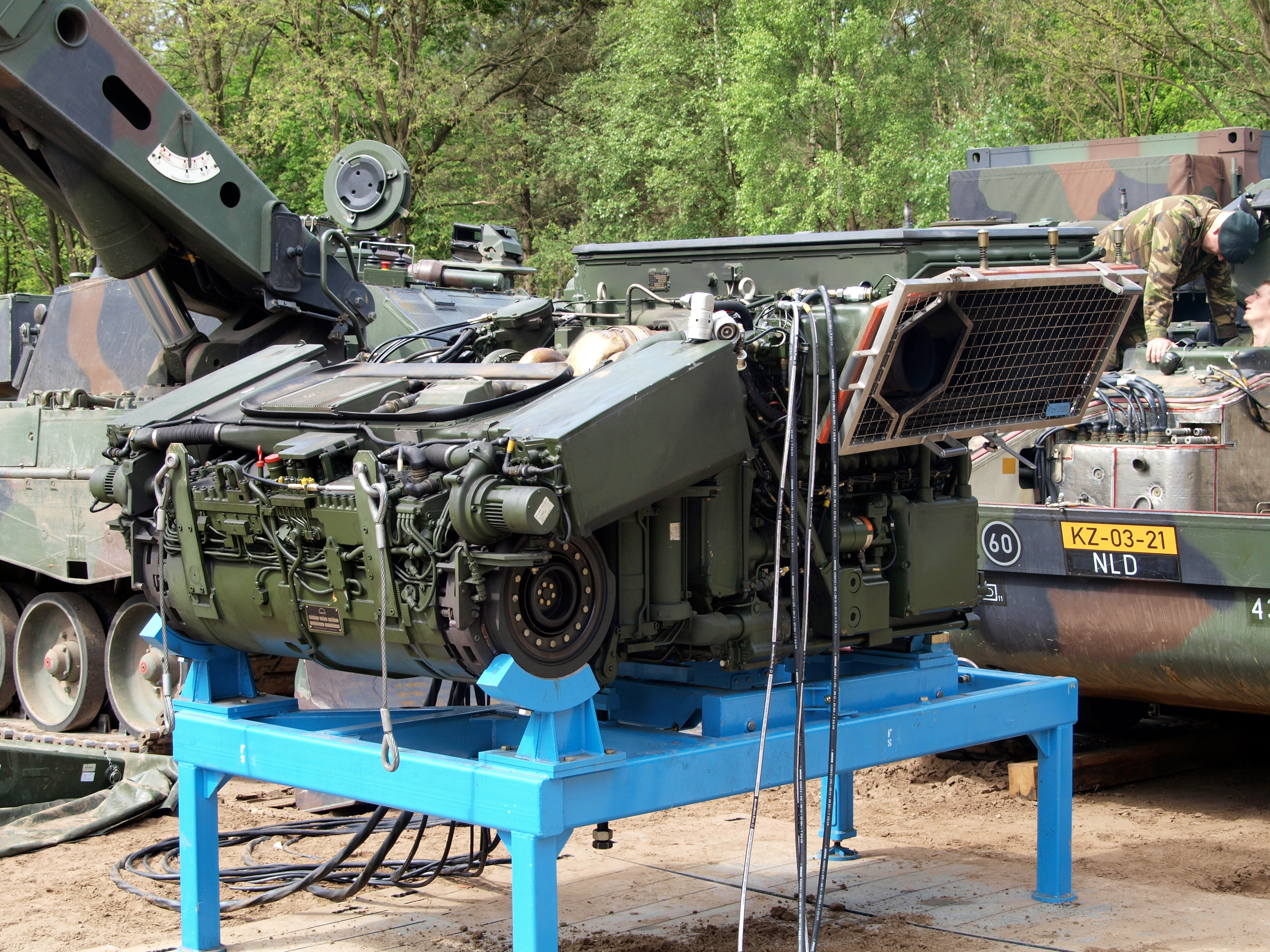 Photographed at the Open house / Open door Landmachtdagen 2012 in Oirschot the Netherlands. Pantserhouwitser 2000NL (PzH2000) engine.